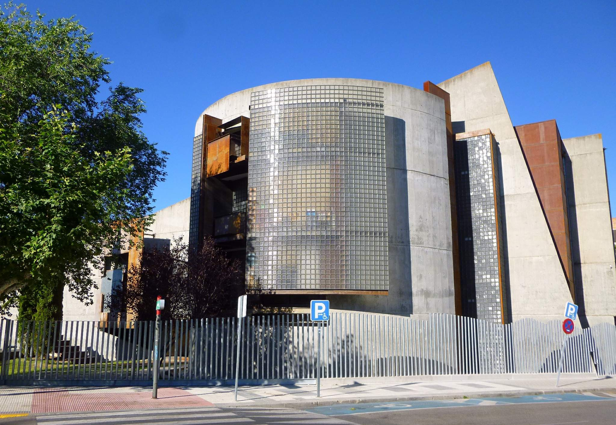 Auditorio Municipal Alfredo Kraus (Majadahonda)